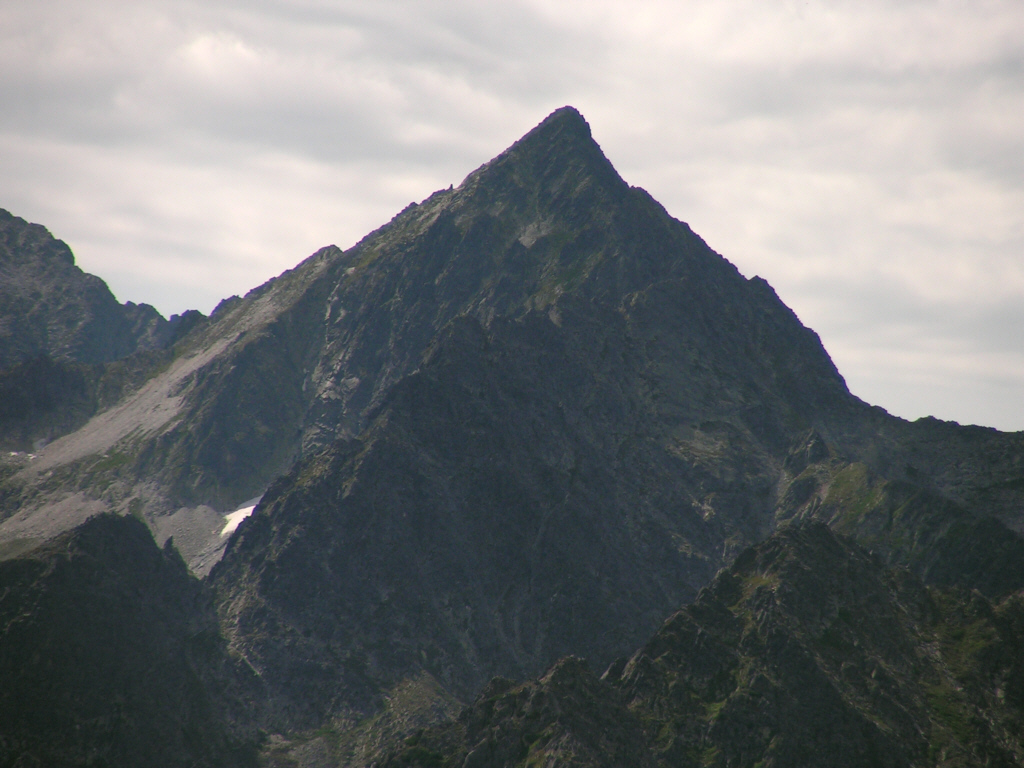 Kołowy Szczyt